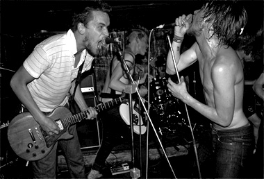 Bandet The Spectacle.